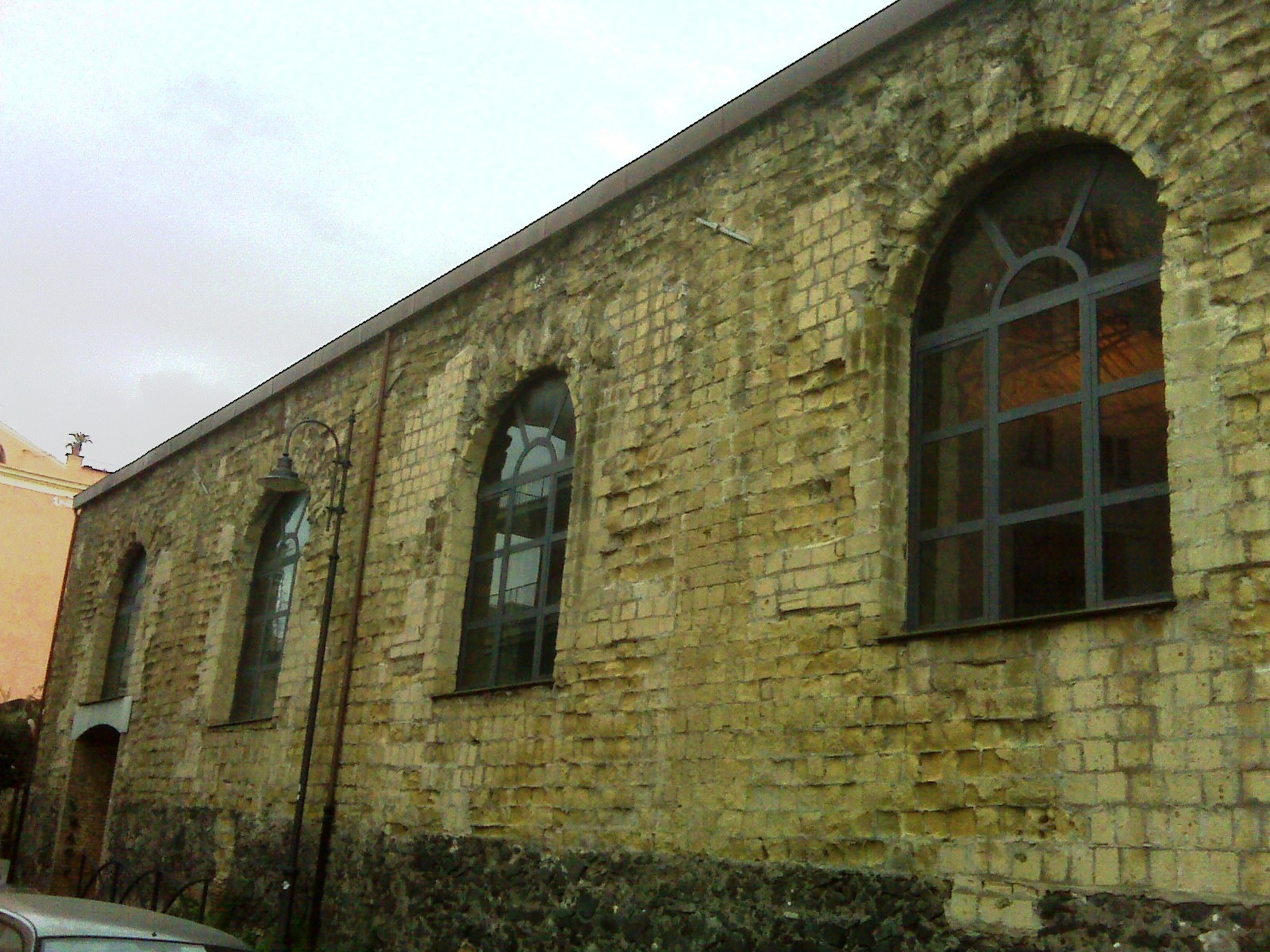 L'edificio delle fonderie Righetti, annesso a Villa Bruno